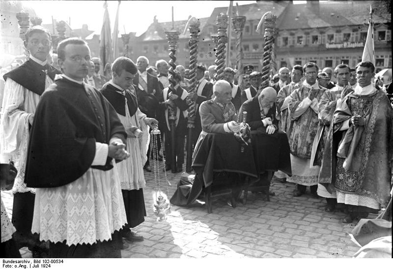 Zur 900 Jahr-Feier der Stadt Bamberg in Bayern fand anläßlich derselben eine große Prozession unter anwesenheit Ex-Kronprinzen Ruprechts von Bayern, Ex König Ferdinand von Bulgarien, Nuntius Pacelli, sämtlicher Erzbischöfe Deutschland und anderen Hoher Kirchlicher Würdentrager statt. Der Ex Kronprinz von Bayern und der Ex König von Bulgarien beim Gebet auf der Strasse in Bamberg.